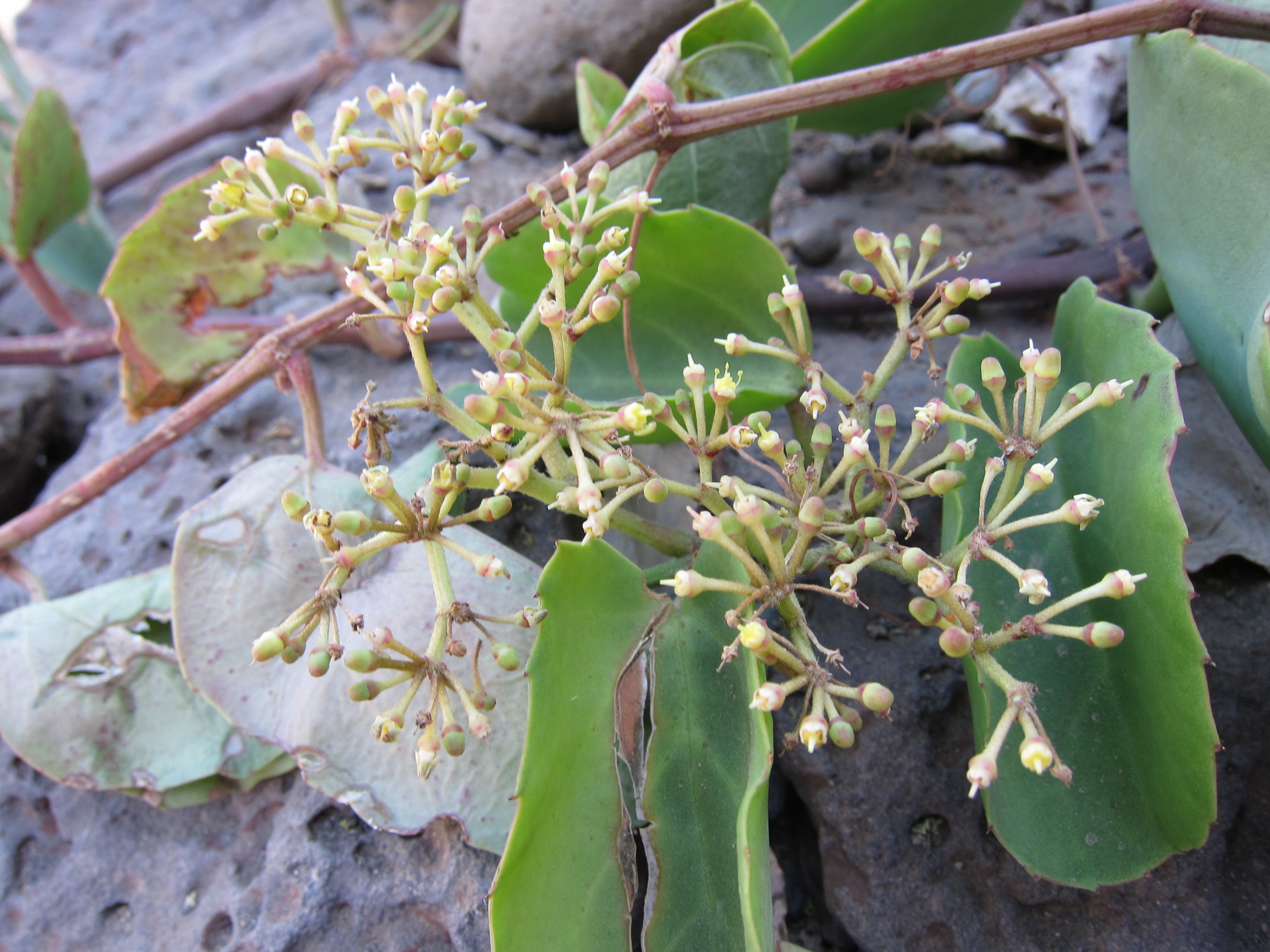 Cissus rotundifolia Vahl, Monts Goda, Djibouti